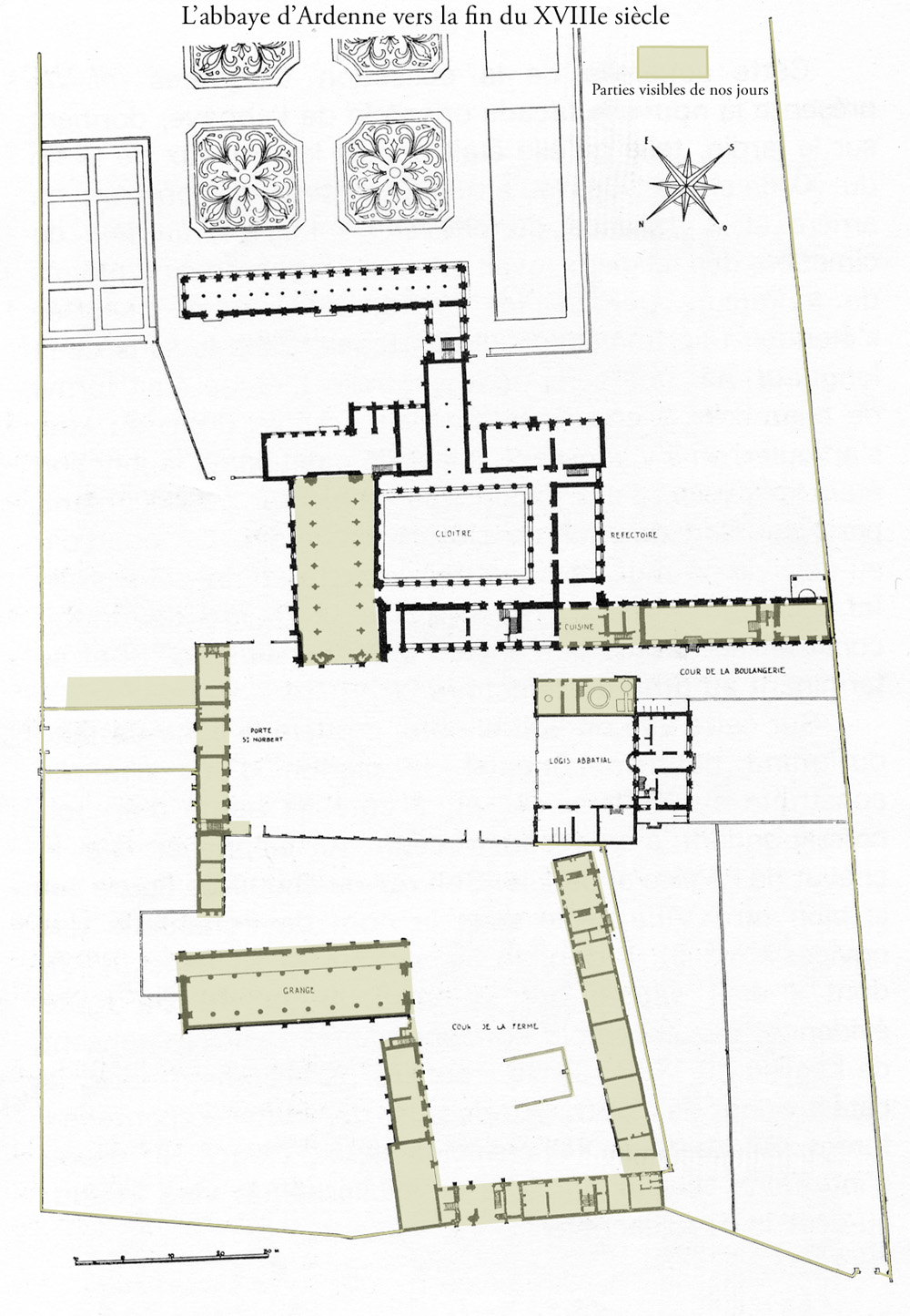 Plan de l'abbaye d'Ardenne vers la fin du XVIIIe siècle d'après Lambert et Braunwald, 1938.